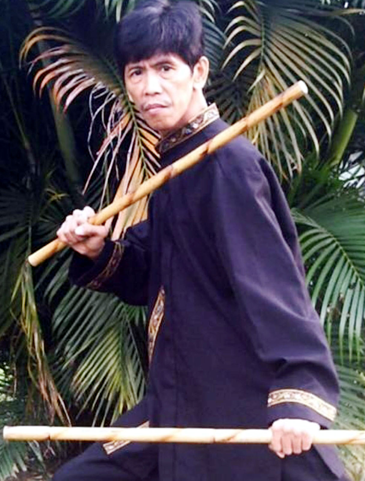 Grandmaster Jonathan Makilinh Abaya